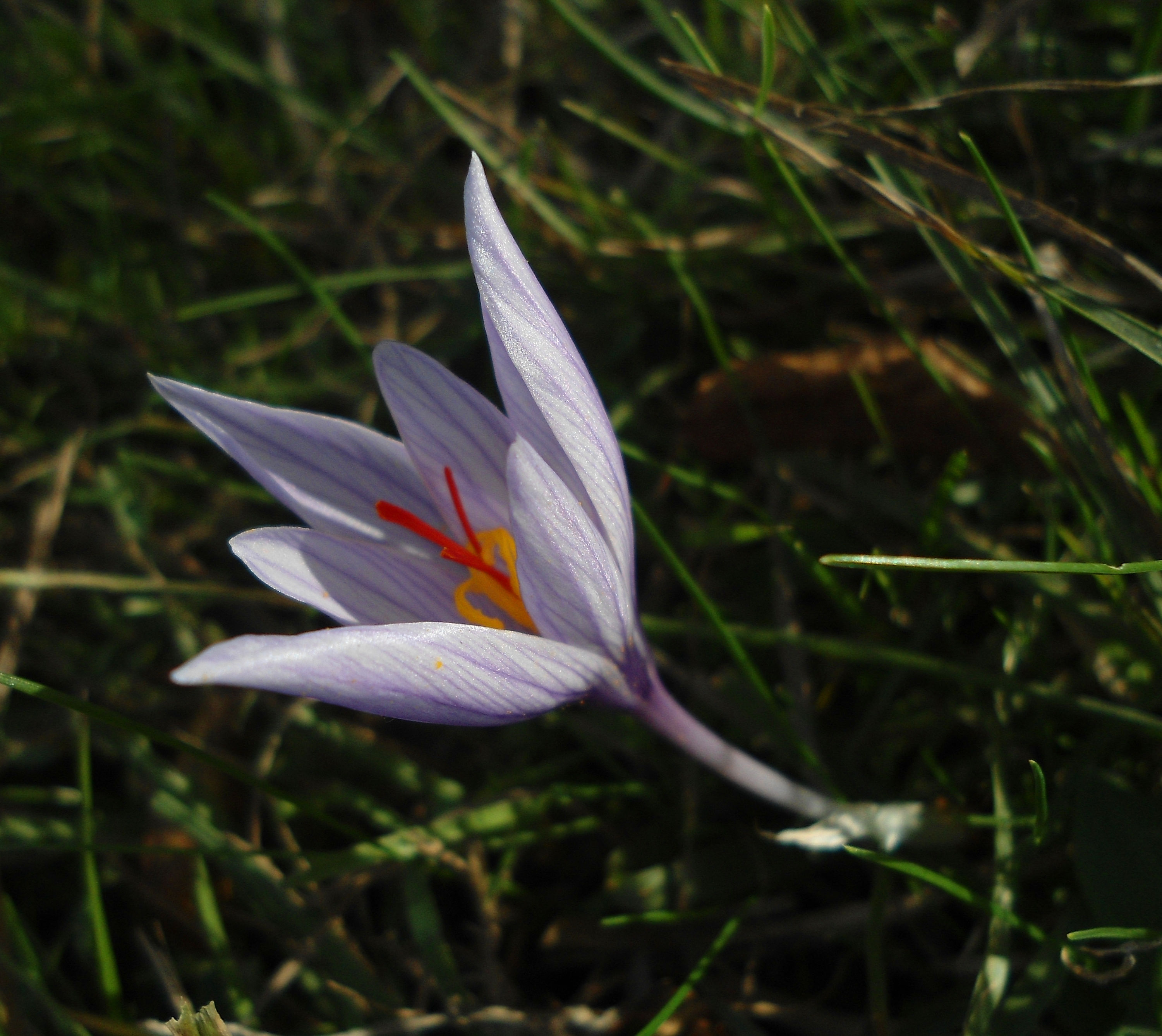 Паласов минзухар (Crocus pallasii) - цвете от семейство Перуникови, цъфтящо през есента. Този представител е с по-светли венчелистчета.